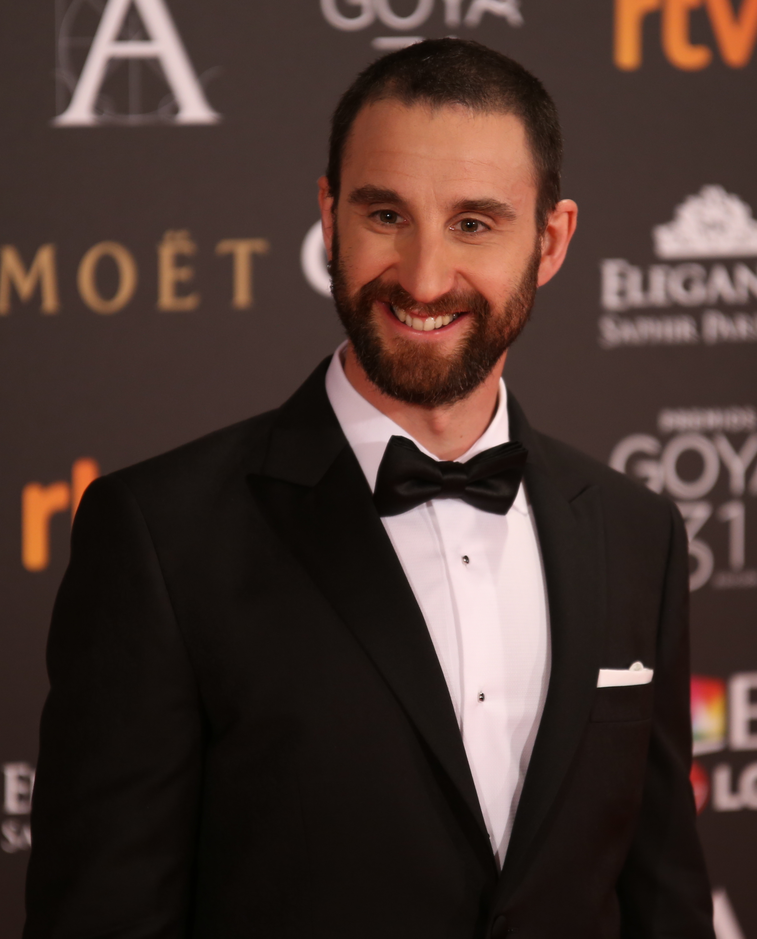 Dani Rovira en la gala de los Premios Goya 2017